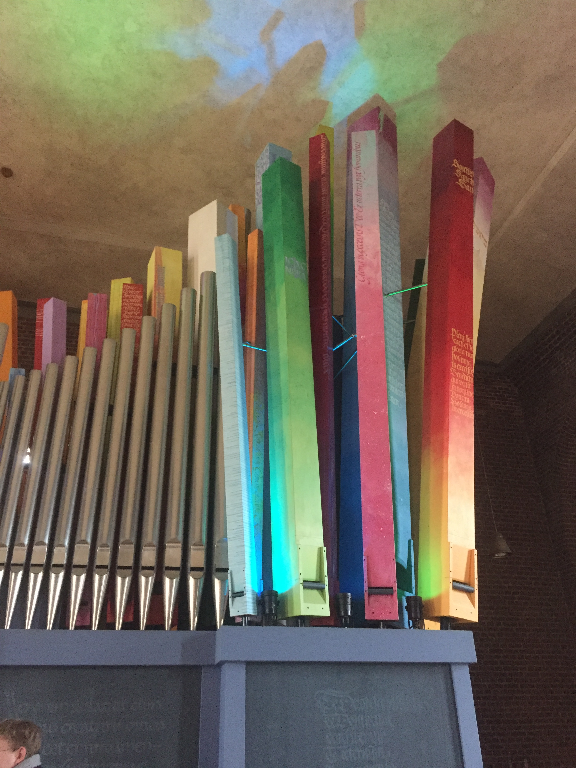 Die Kirche St. Elisabeth in Augsburg-Lechhausen, rechter Teil der Orgelpfeifen mit buntem Licht